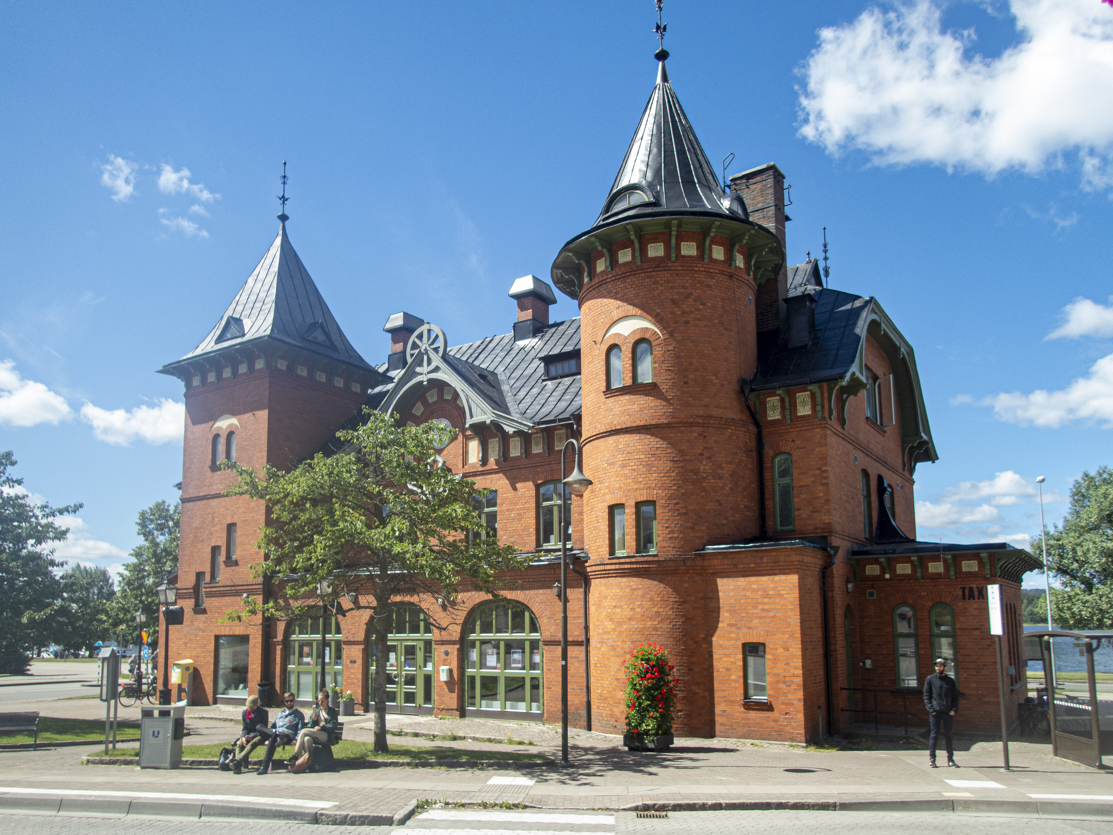 Ulricehamns järnvägsstation, Uppfört 1905. Arkitekt Axel Peterson